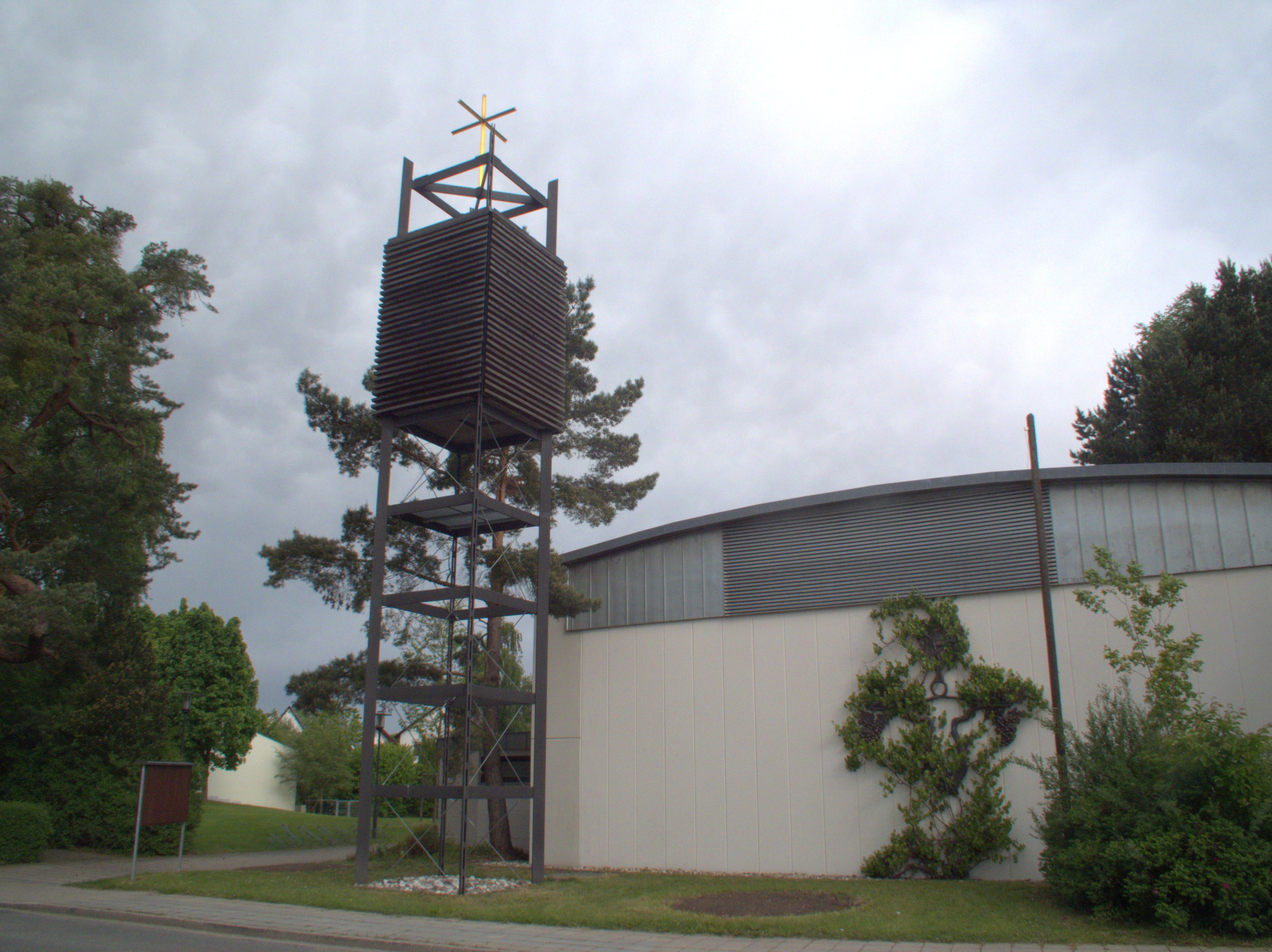 Die katholische Filialkirche St. Walburga Am Sand 3 im Neumarkter Ortsteil Holzheim: Südseite außen von der Straße